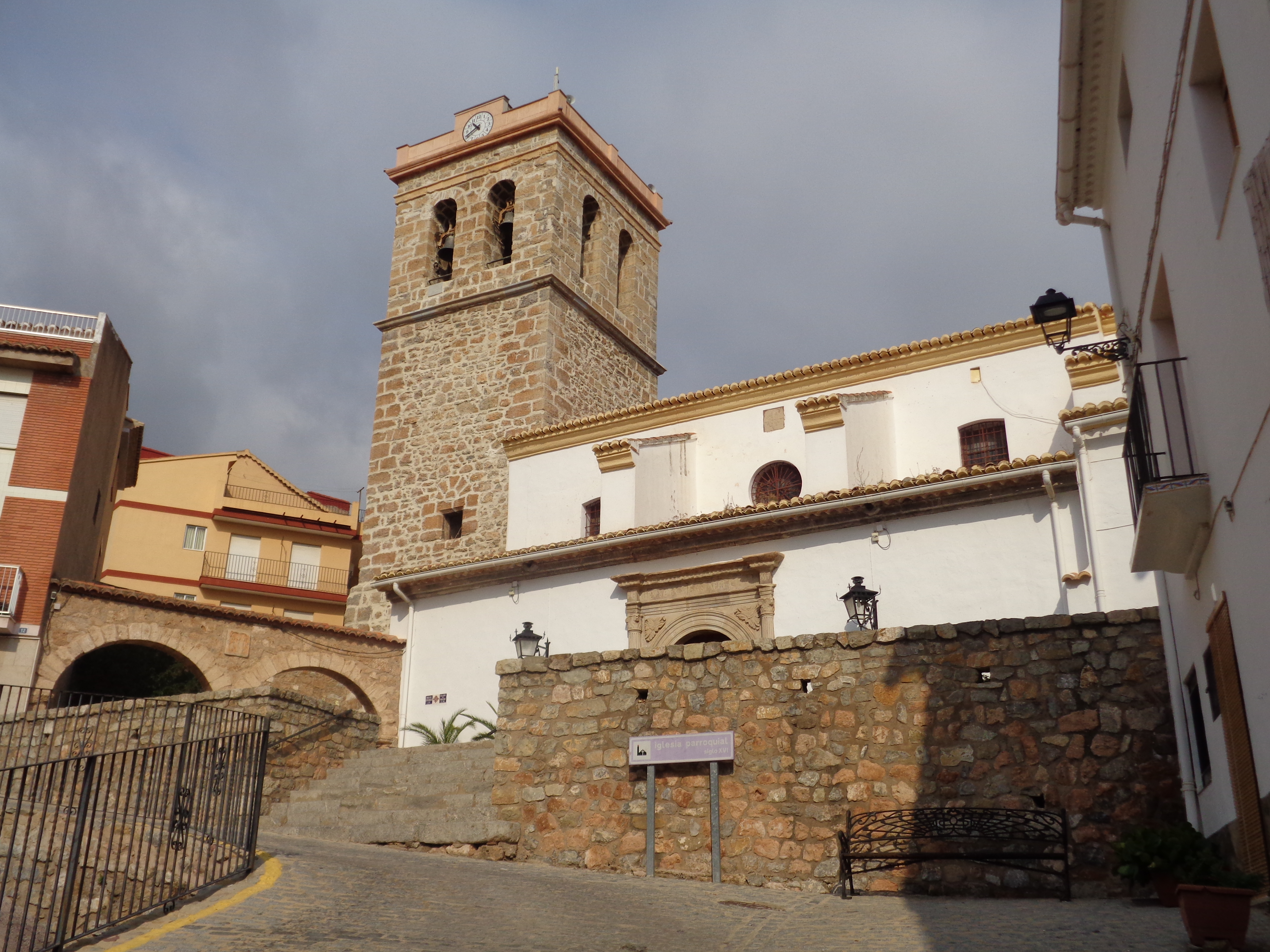 Begís. 07.022-001.